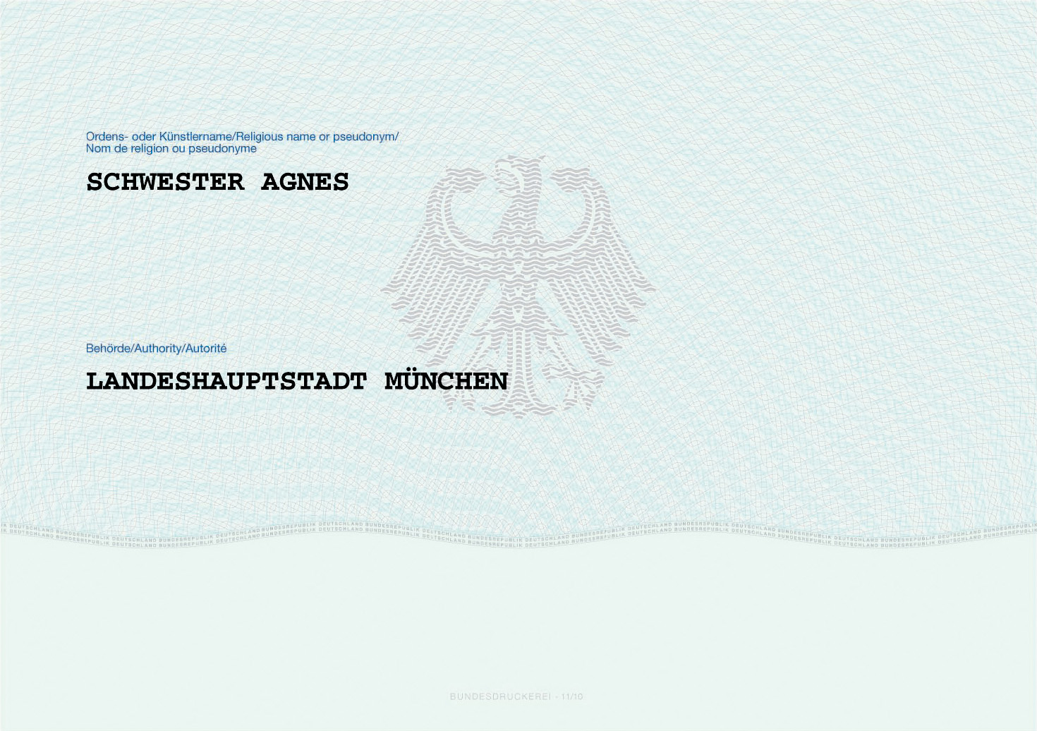 Muster des deutschen vorläufigen Personalausweises, Rückseite